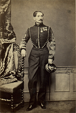 Colonel Maurice Théodore Boutet de Mazug (1809- ) 2e Chasseurs